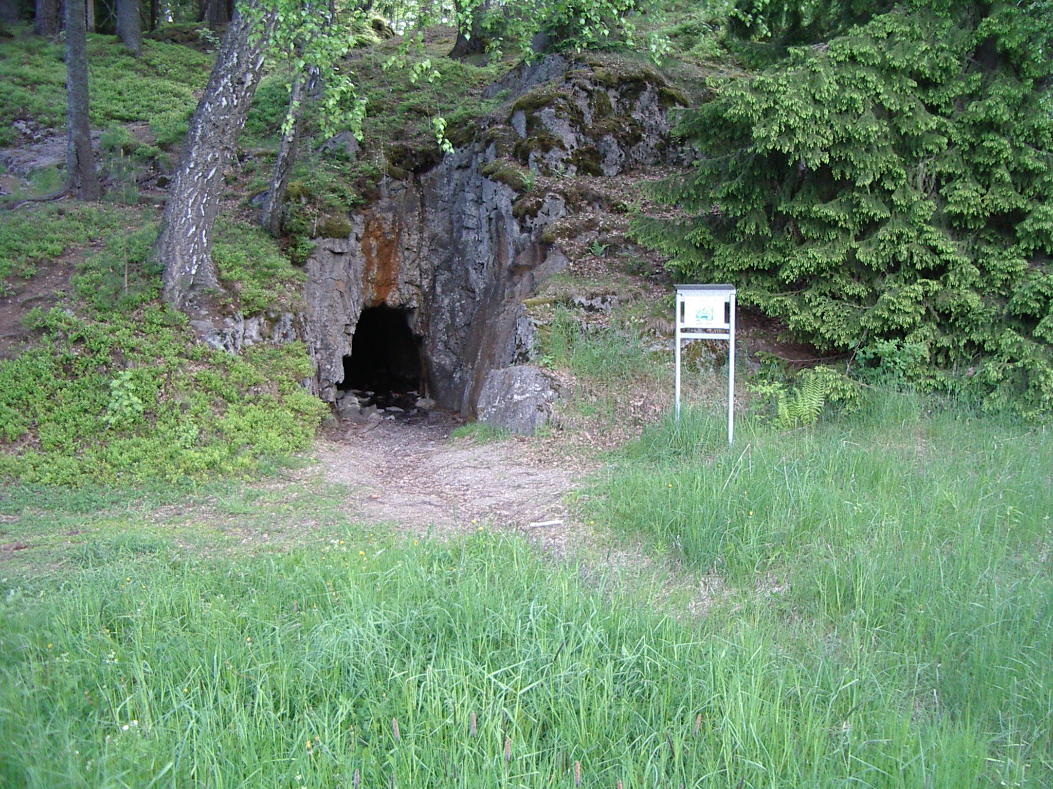 Ingången till Alsgruvan sommartid.